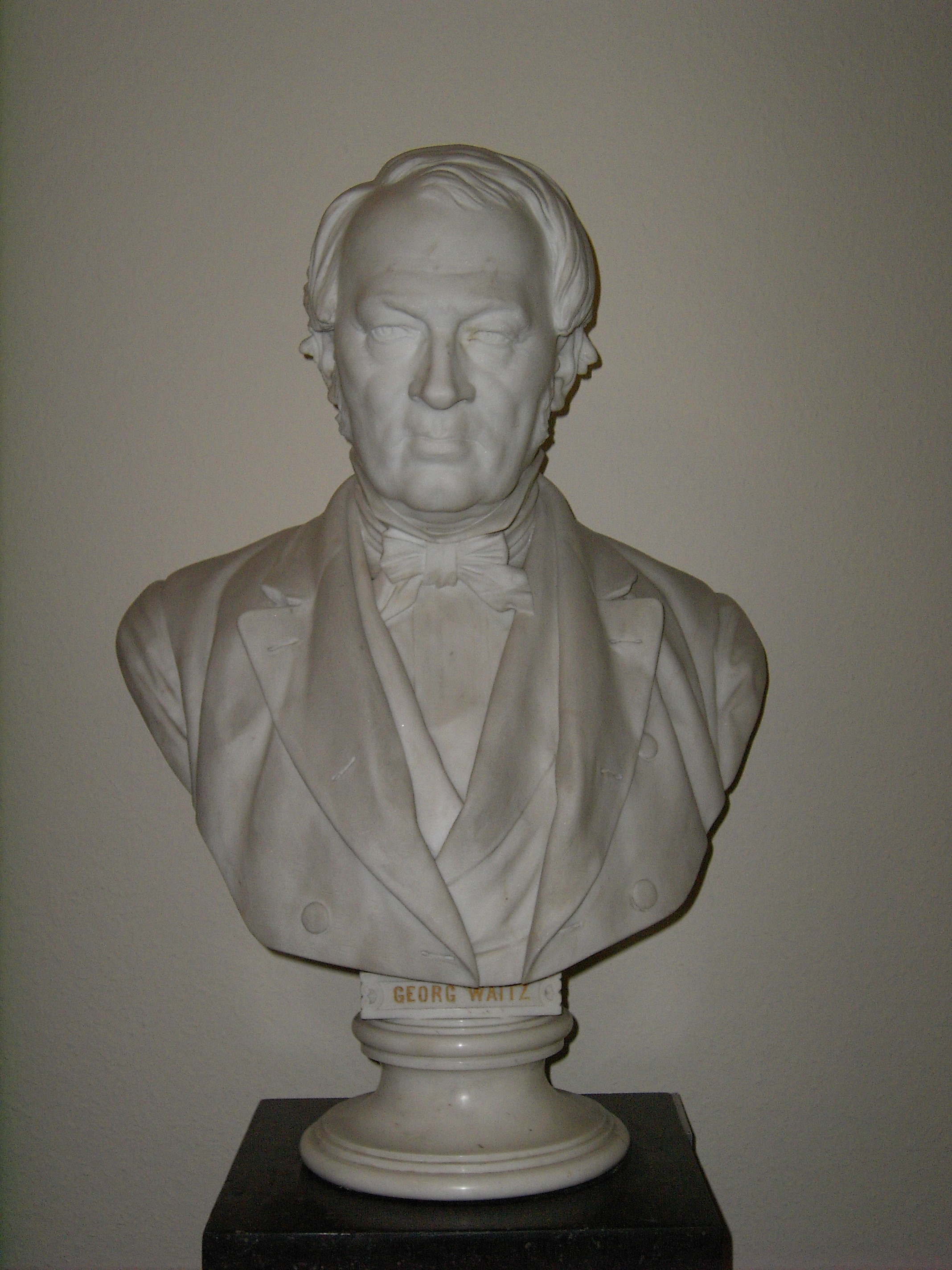 Büste des Historikers Georg Waitz (1813-1886). Die Büste wurde 1887 von Carl Ferdinand Hartzer (1838-1906) geschaffen.